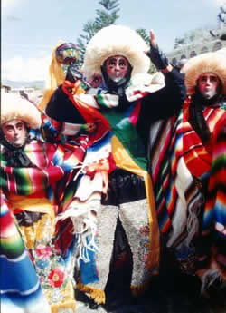 Uno de los artículos más leídos y publicados de la obra de José Félix Zavala dentro de la microhistoria, fue publicado por la Revista de Revistas de Excelsior, por la Revista de la Frontera Sur y le valió el premio a la Universidad Autónoma de Chiapas y ha sido traducido a diferentes lenguas, principalmente el Inglés y el Francés.